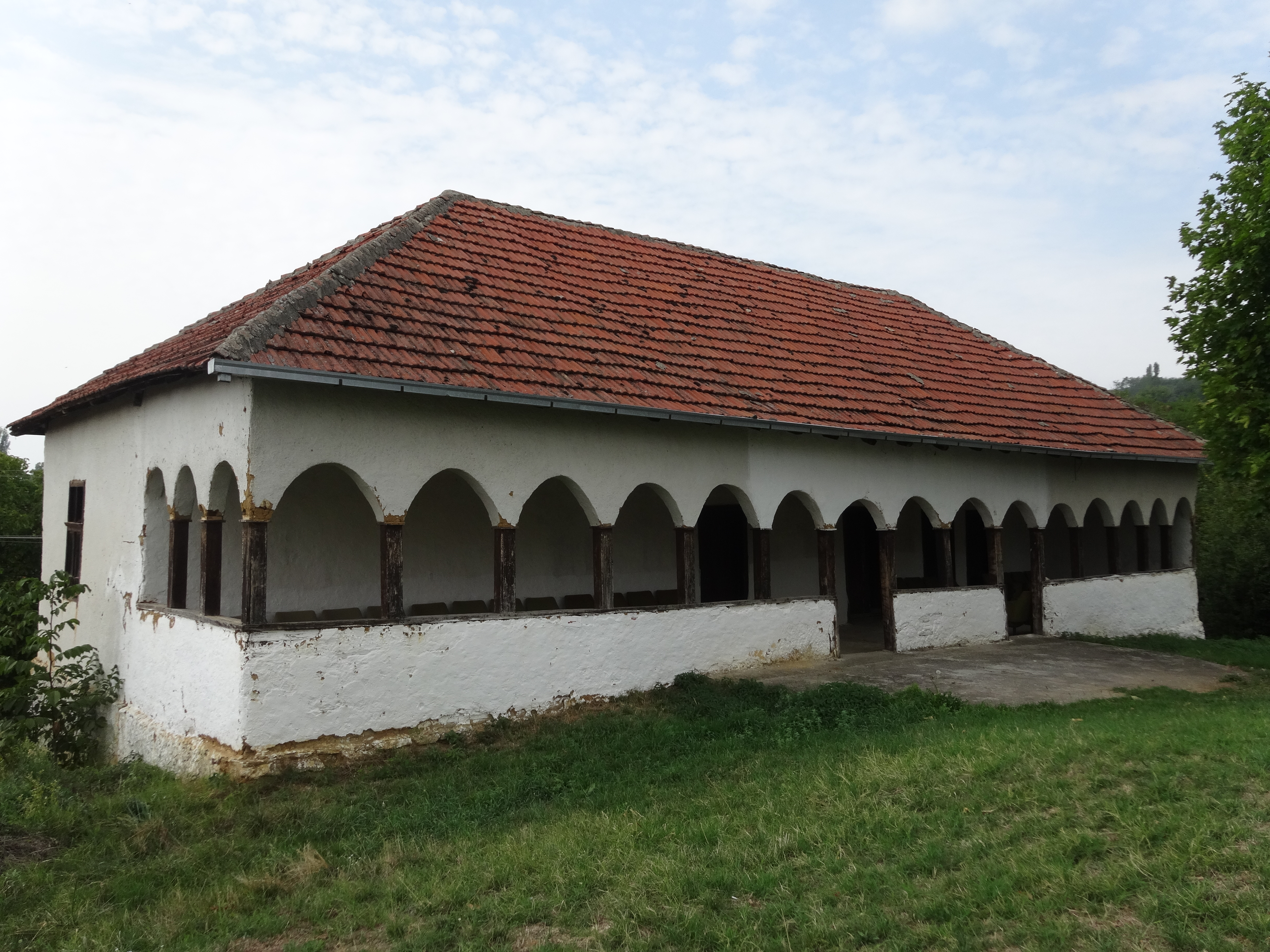 Jarsenovo, Leskovac, Crkva Svetog Nikolaja